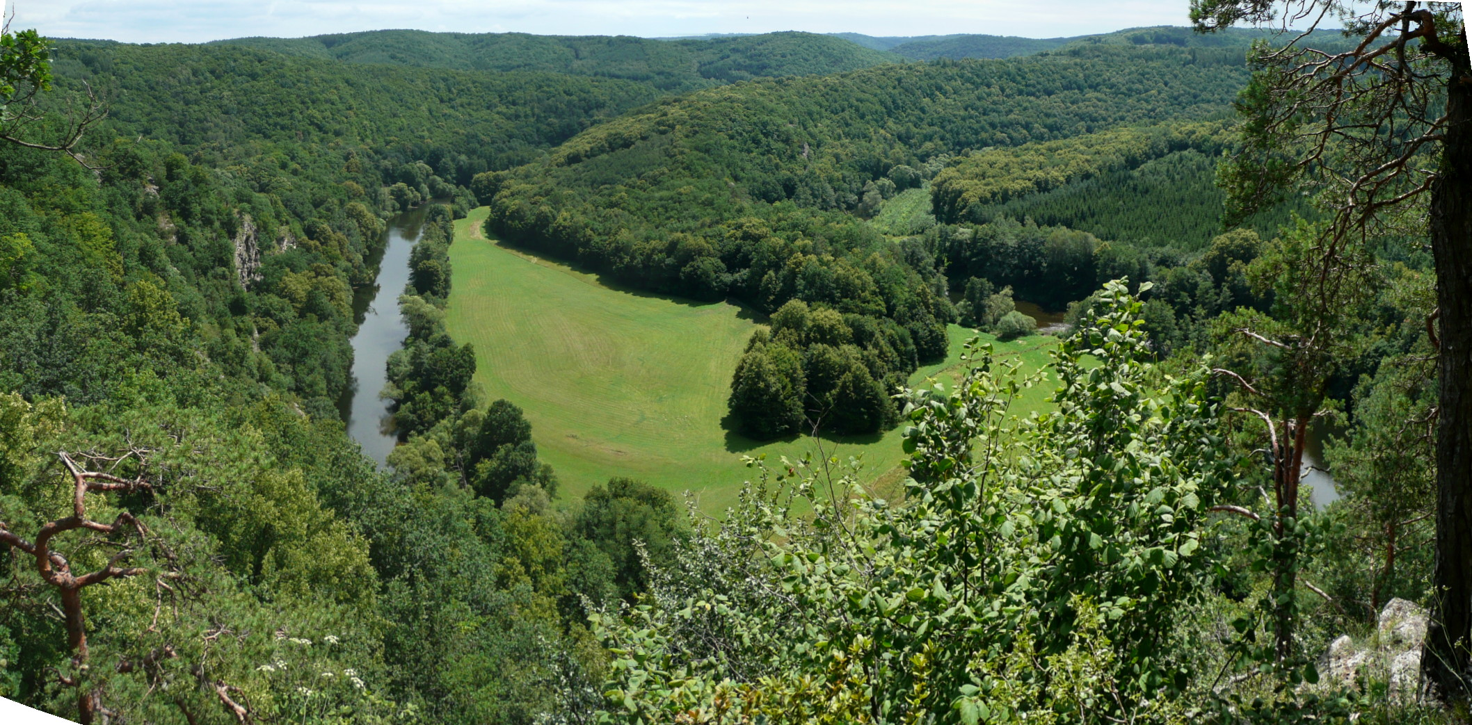 Kaňon Dyje v NP Podyjí.